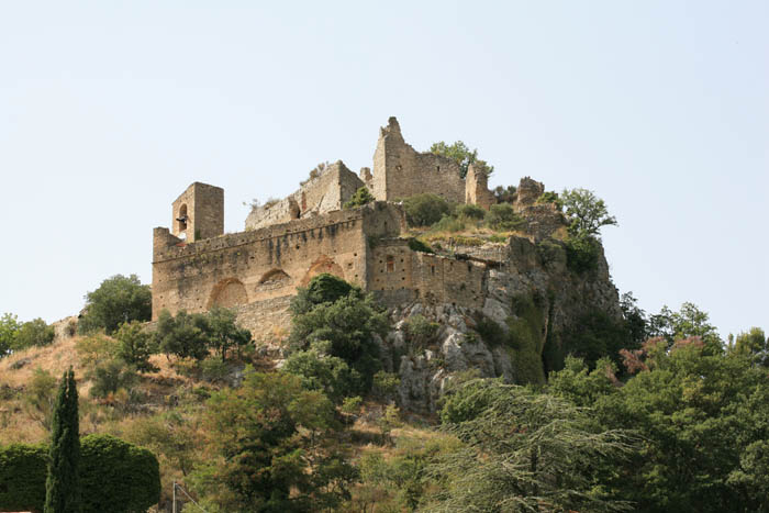 Entrechaux (Vaucluse, France). Le château, avec l'église Saint-Laurent-la-Vieille.